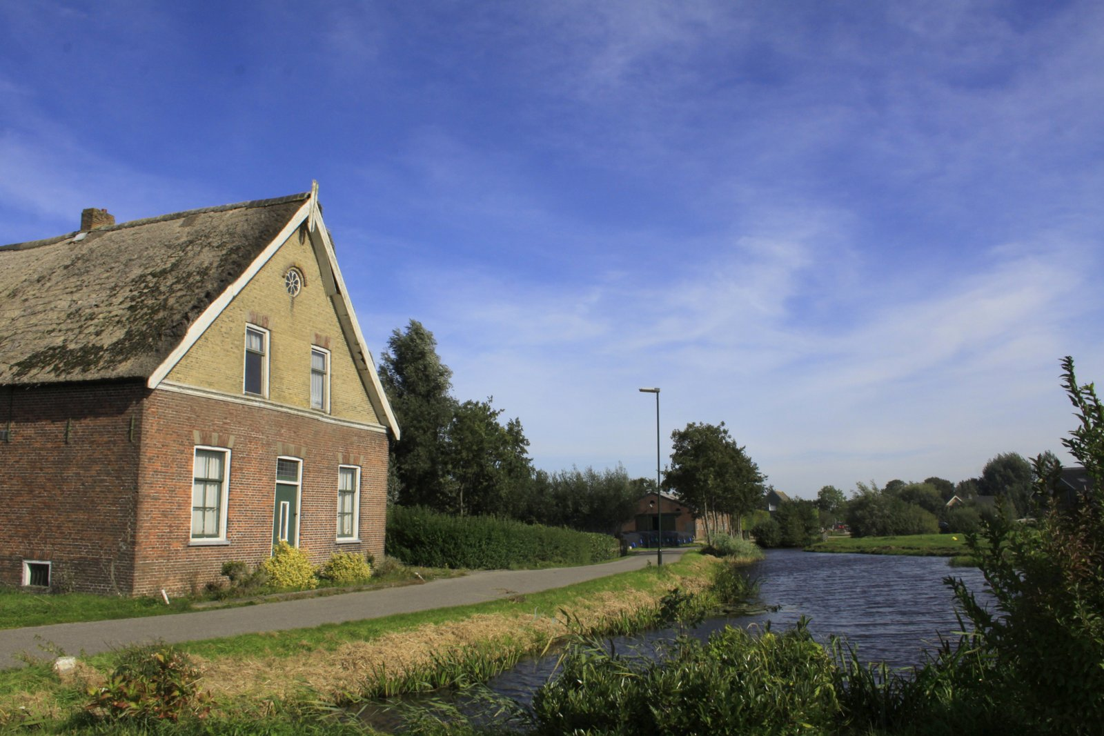 Mooi gelegen boerderij in het buurtschap achterland beneden Groot-Ammers.